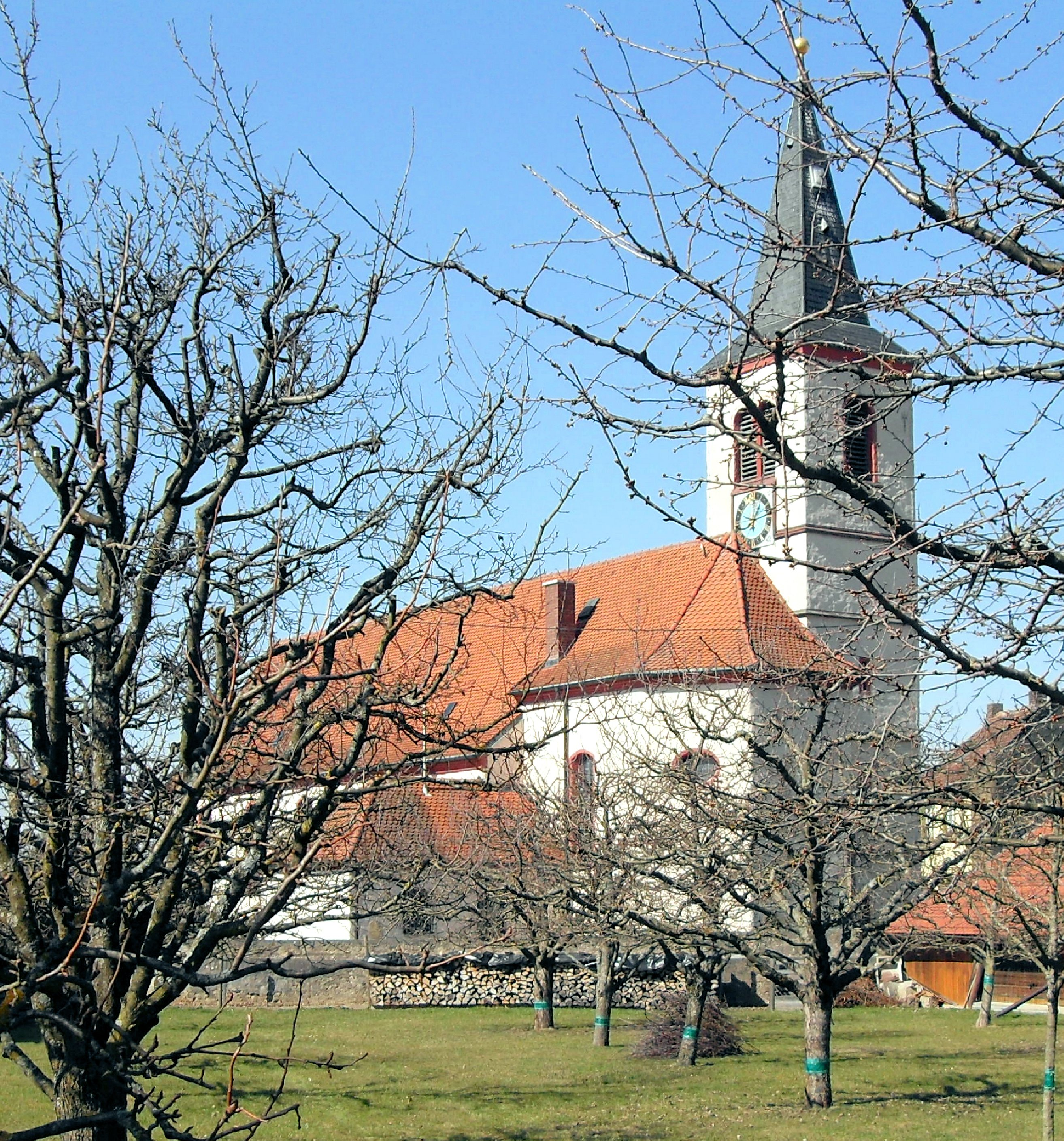 Kirche St. Agatha in Grunern, Südostseite